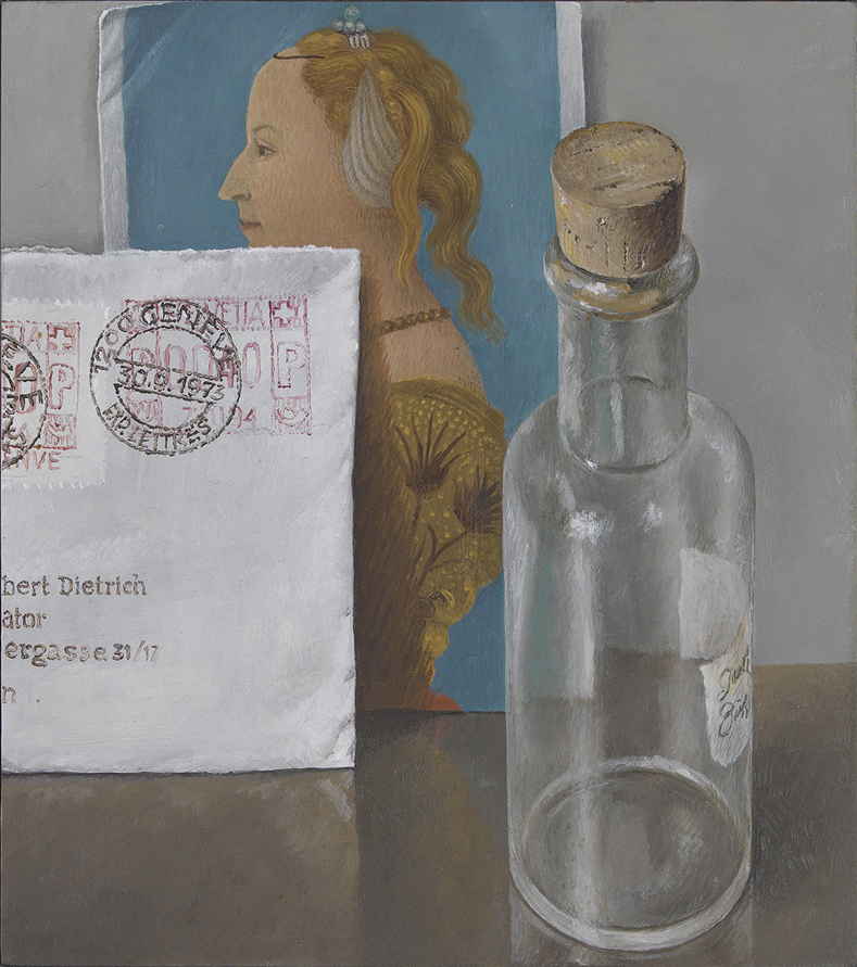 Hubert Dietrich (1930–2006): Stillleben mit Kunstkarte, Öl auf Holz, 19 x17cm, 1973, WVZNr. 36